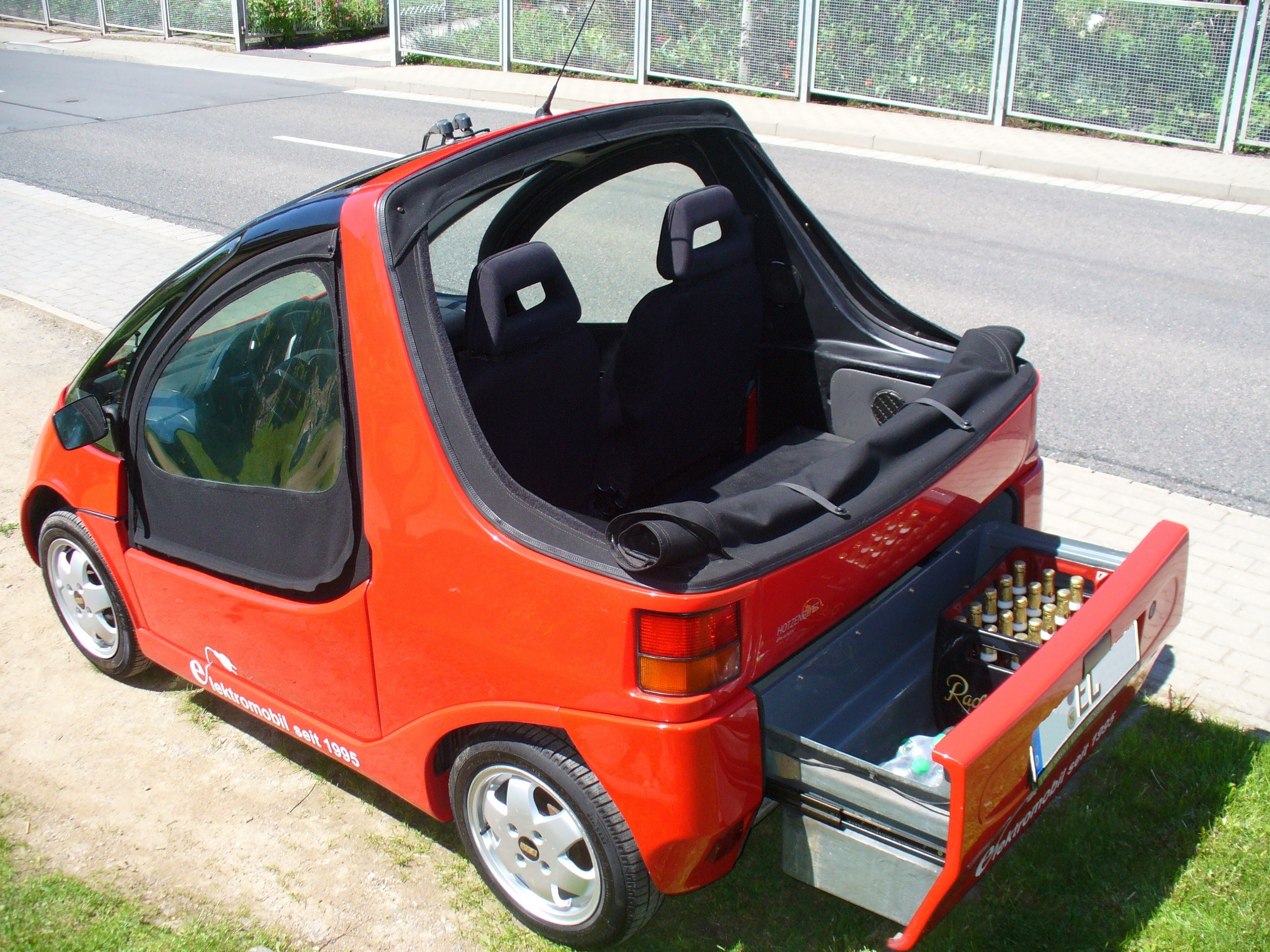 Elektroauto Hotzenblitz Buggy (EL Sport) mit GfK-Karosserie, geschlossenen Stofftüren, geöffnetem Stoffverdeck mit Blick auf die hintere gepolsterte Ablage (Notsitze) und geöffneter Kofferraum-Schublade